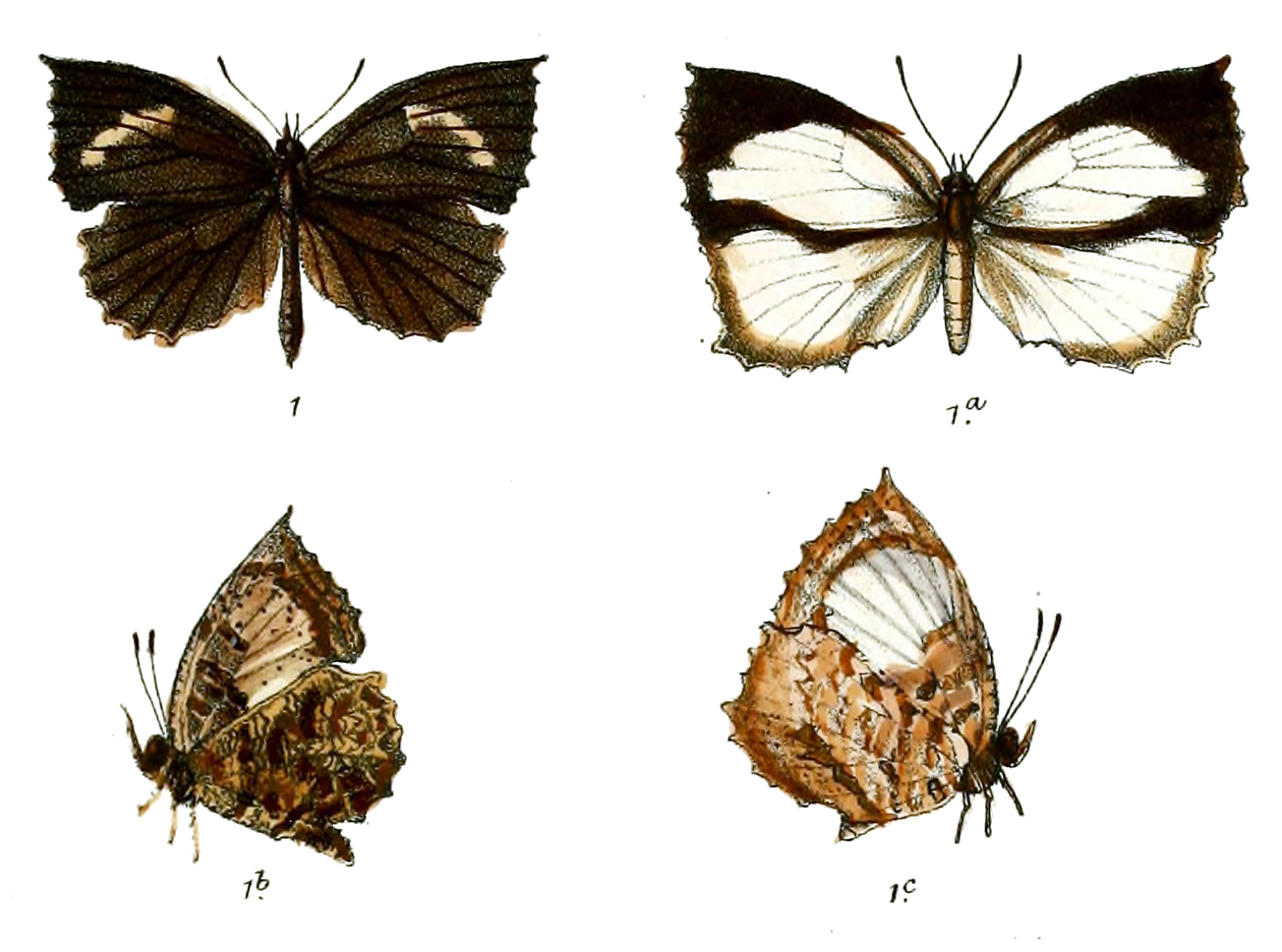 Allotinus drumila